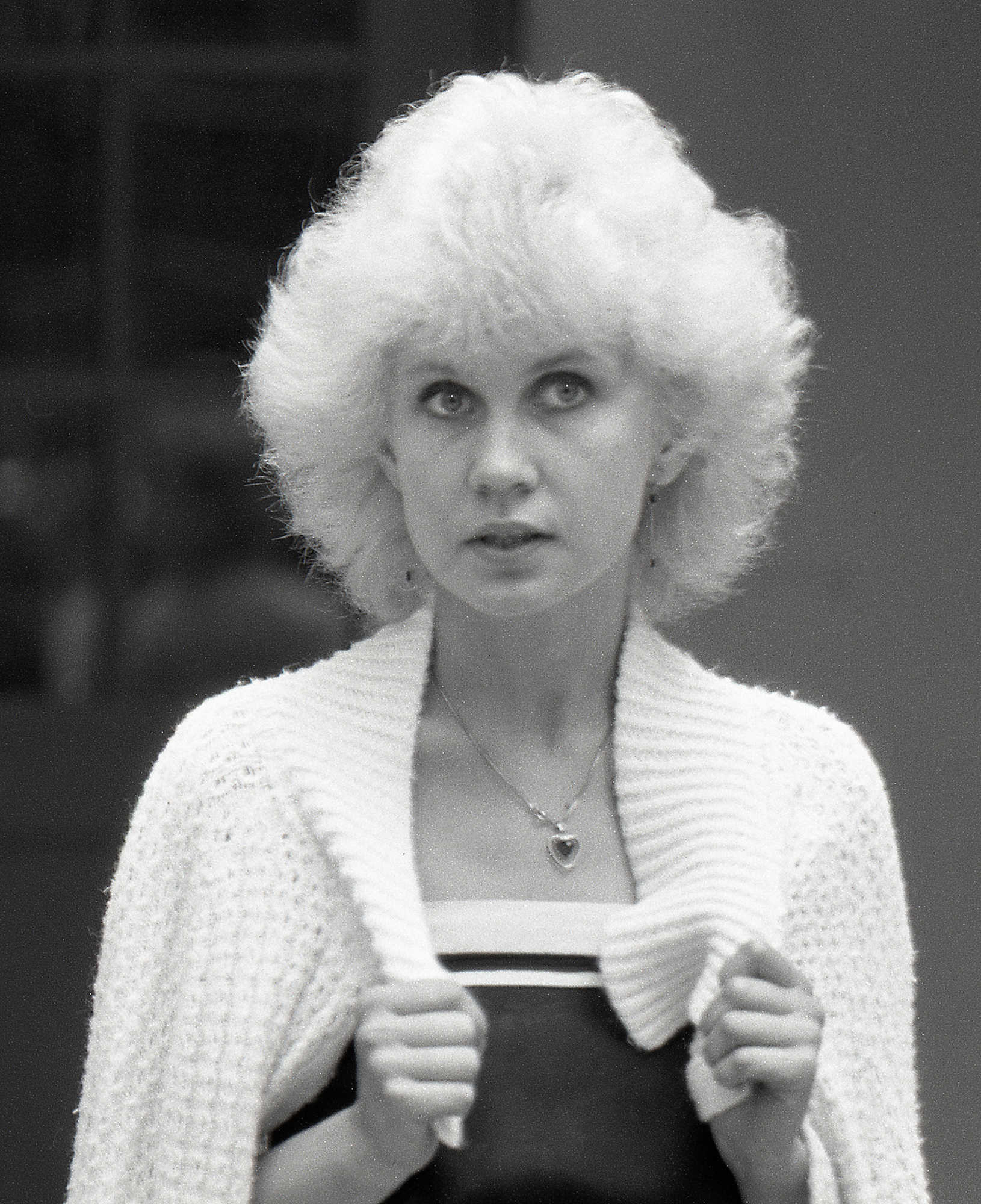 Anu Presjärv